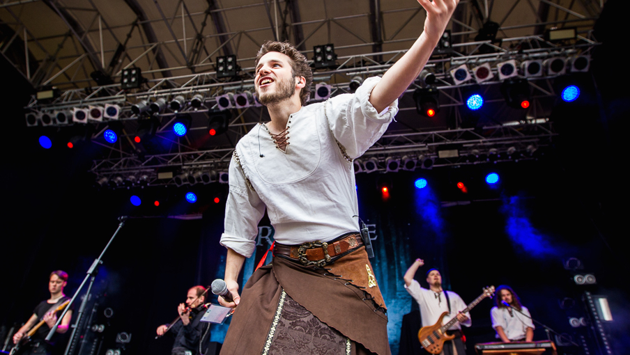 Frontsänger Bastus beim Feuertanz Festival 2015.